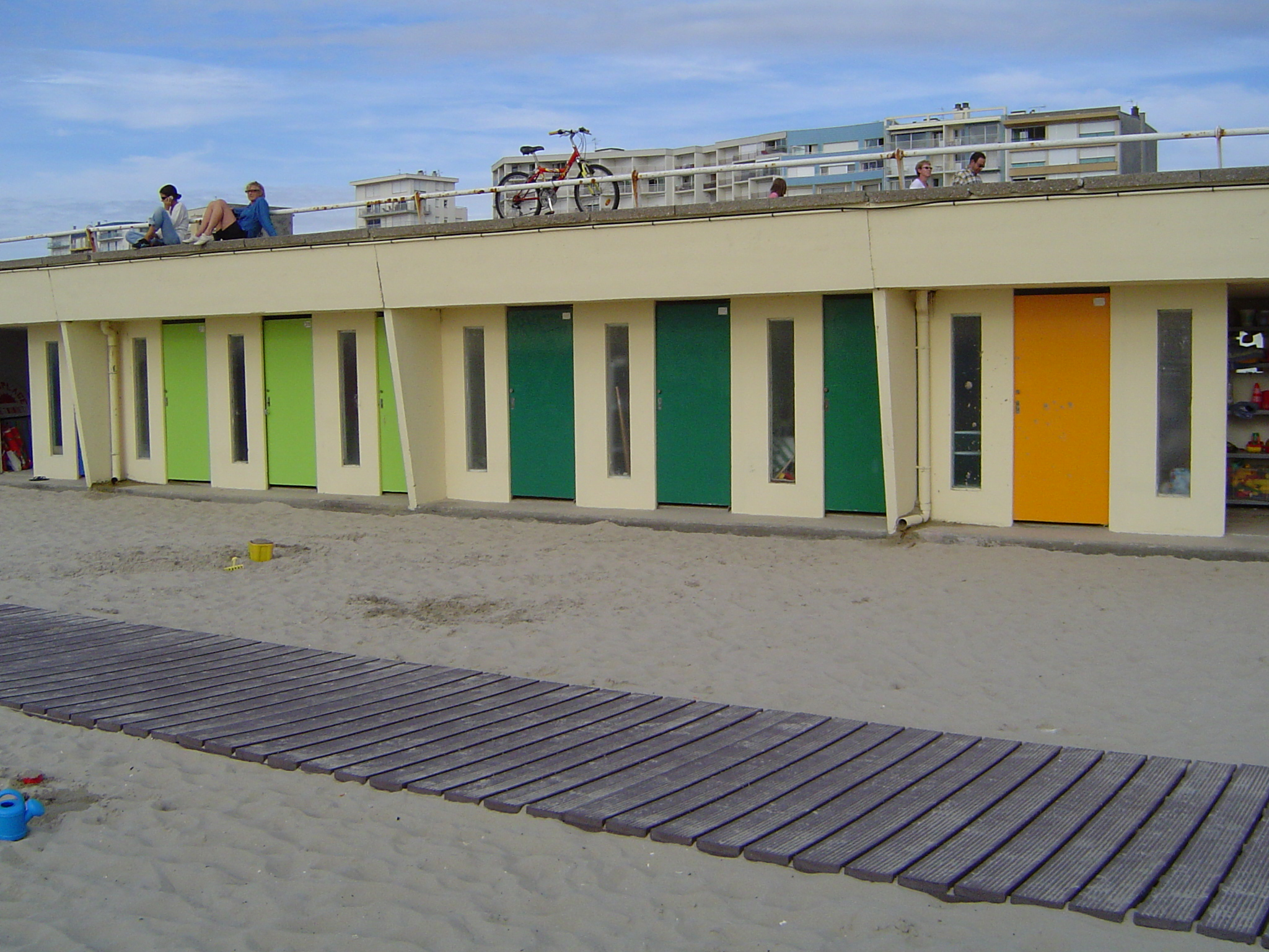 Photos prises dans la commune du Touquet-Paris-Plage